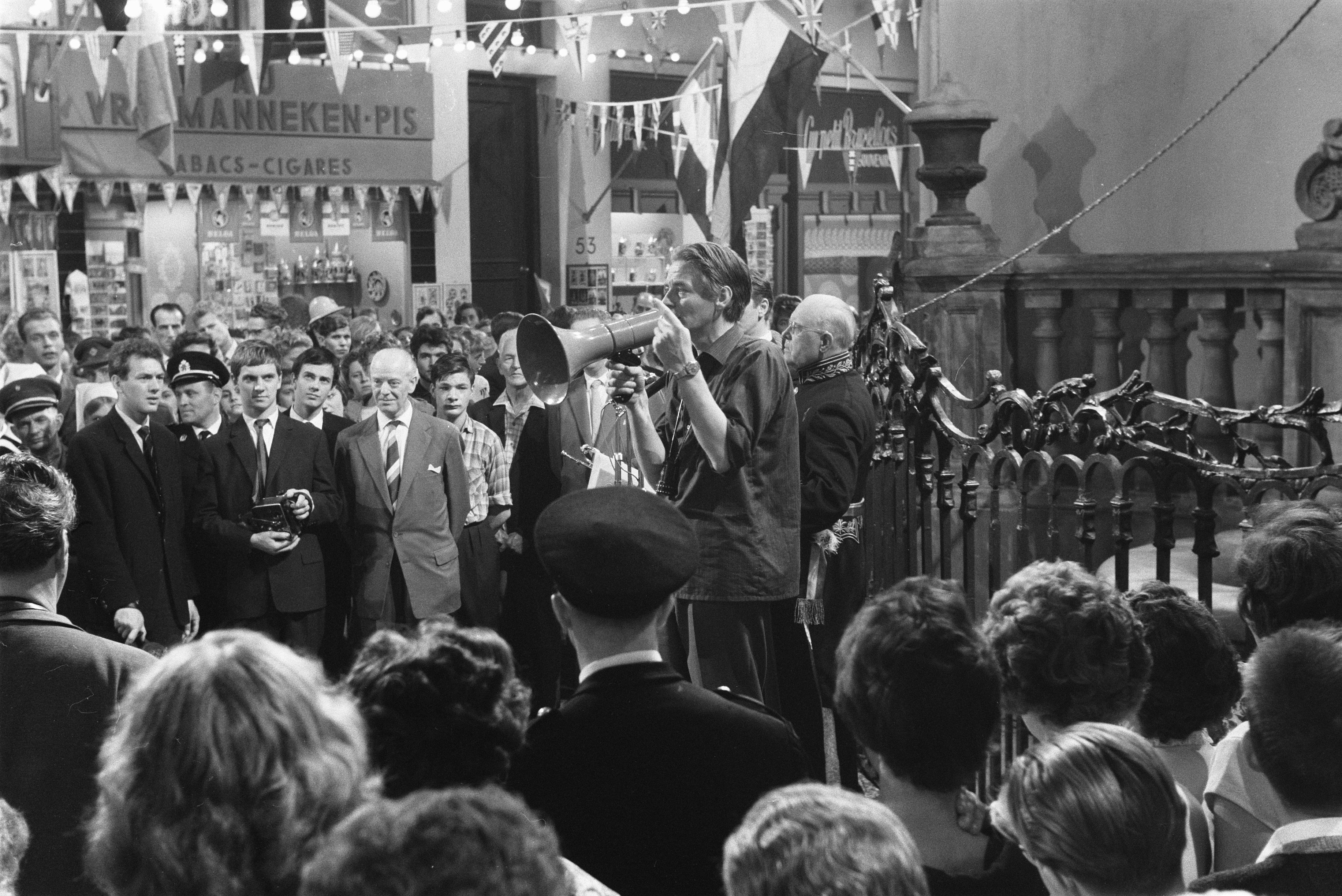 Collectie / Archief : Fotocollectie Anefo Reportage / Serie : [ onbekend ] Beschrijving : Nieuwe film van Bert Haanstra "De Zaak M.P." opgenomen in Cinetone studio te Amsterdam. Regisseur Haanstra geeft aanwijzingen per megafoon Datum : 16 mei 1960 Locatie : Amsterdam, Noord-Holland Trefwoorden : filmregisseurs, films, filmstudios Persoonsnaam : Haanstra, Bert Fotograaf : Pot, Harry / Anefo Auteursrechthebbende : Nationaal Archief Materiaalsoort : Negatief (zwart/wit) Nummer archiefinventaris : bekijk toegang 2.24.01.05 Bestanddeelnummer : 911-2599